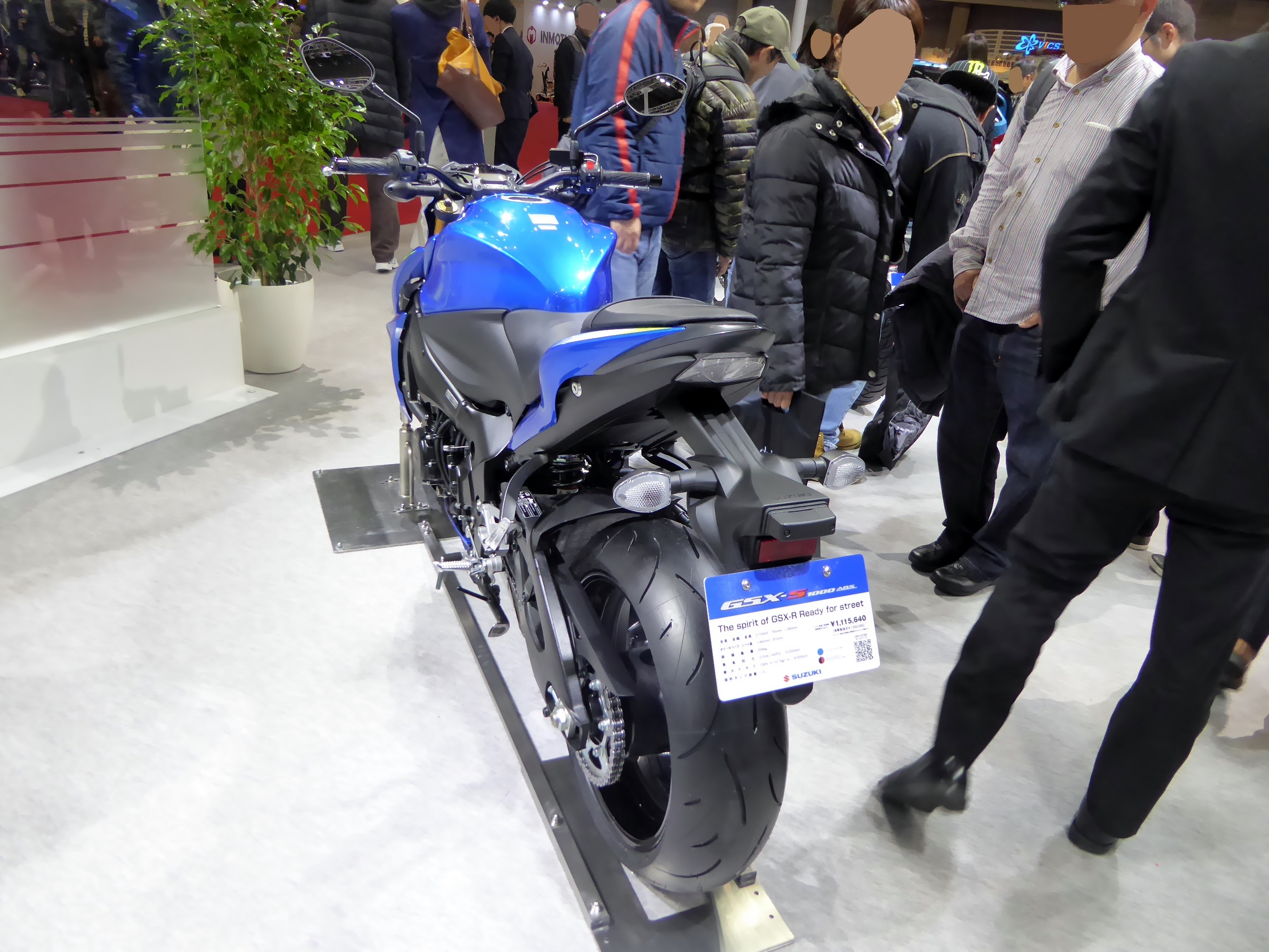 大阪モーターショー2015においてEBL-GT79AB型スズキ・GSX-S1000 ABSを撮影。